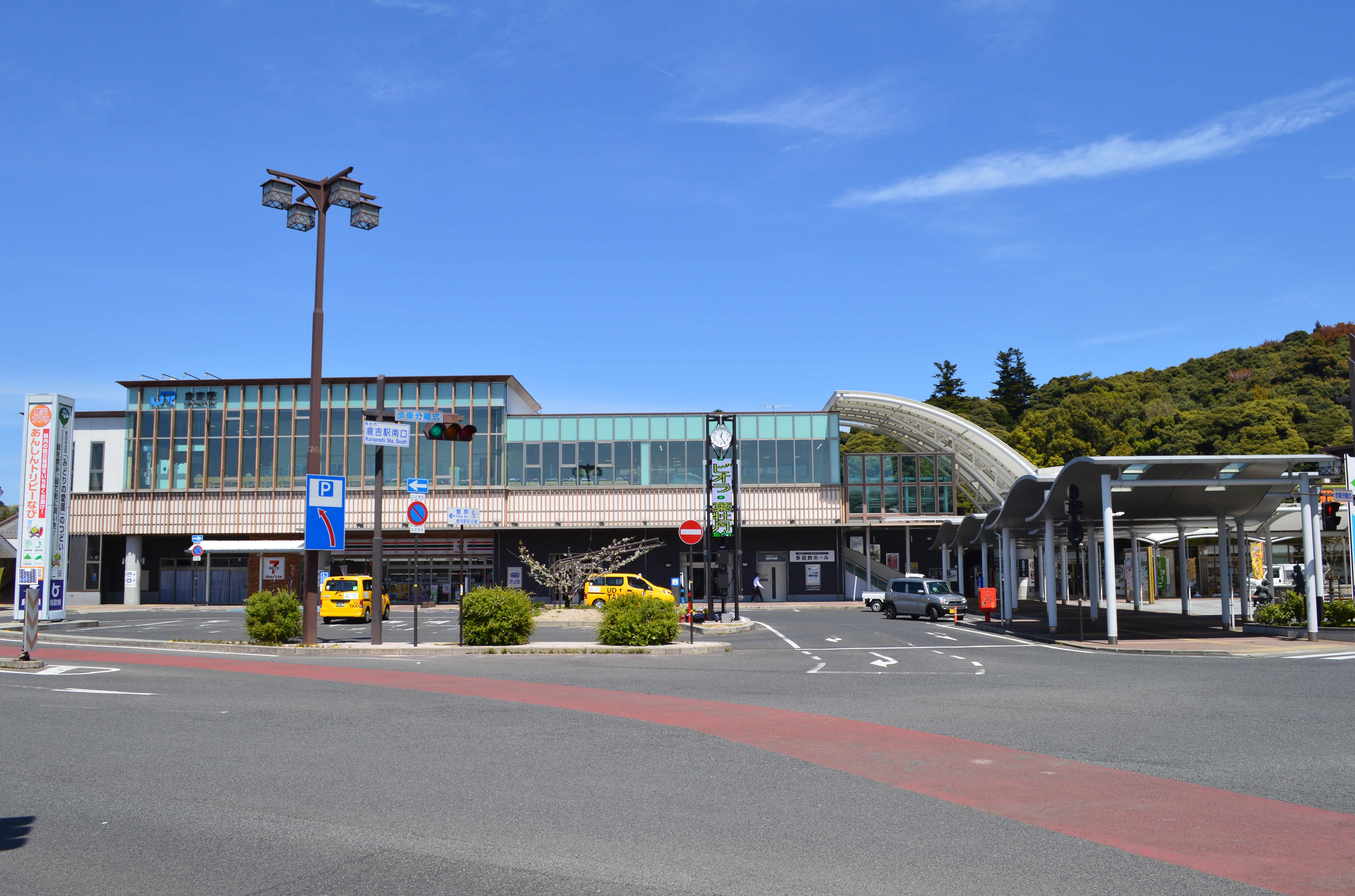 倉吉駅 駅舎 Nikon D3200